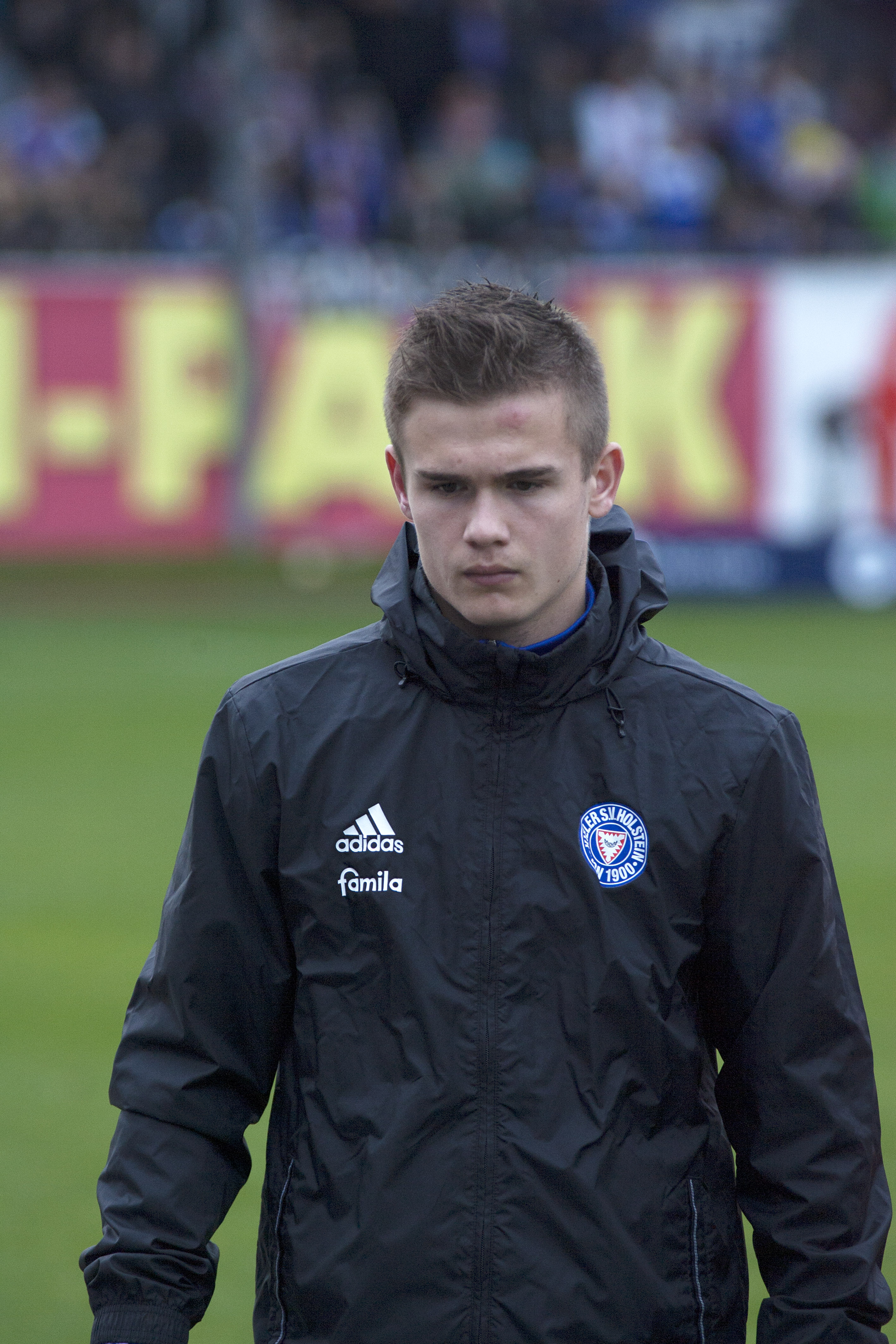 Fabian Arndt (2015)